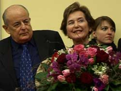 Hans W. Kopp und Elisabeth Kopp an der Premierenfeier des Dokumentarfilms "Elisabeth Kopp - Eine Winterreise" von Andres Brütsch an den 42. Solothurner Filmtagen im Palais Besenval, Solothurn